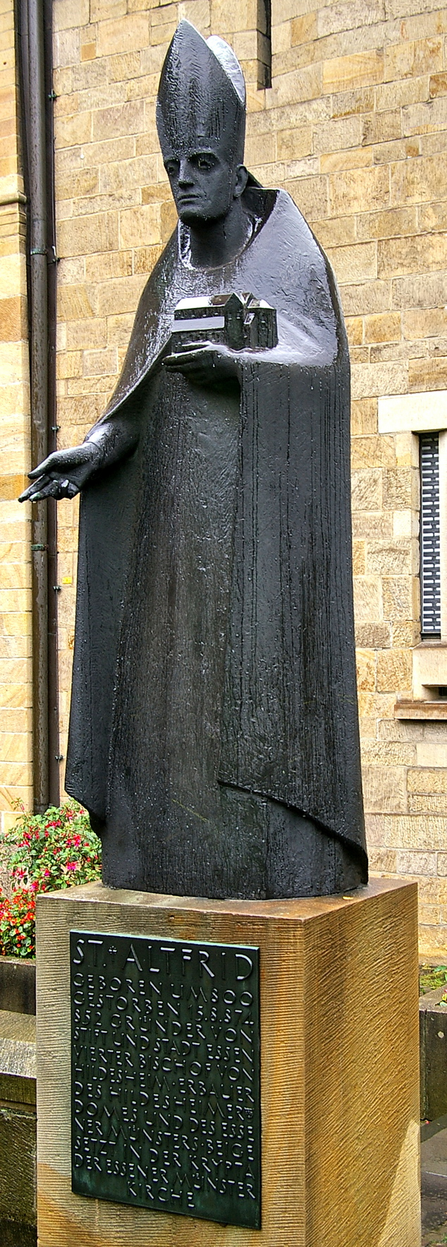 Statue des Bischofs von Hildesheim Atfrid vor der Domschatzkammer des Essener Münsters.